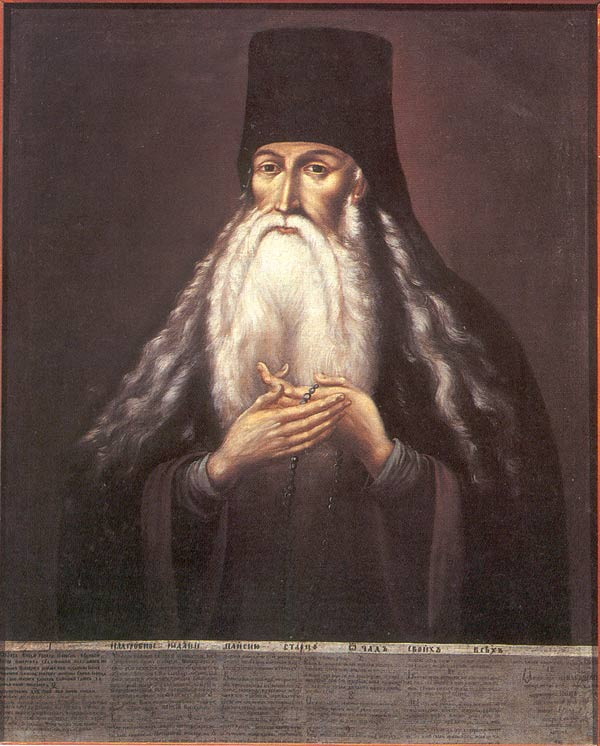 Saint paisius